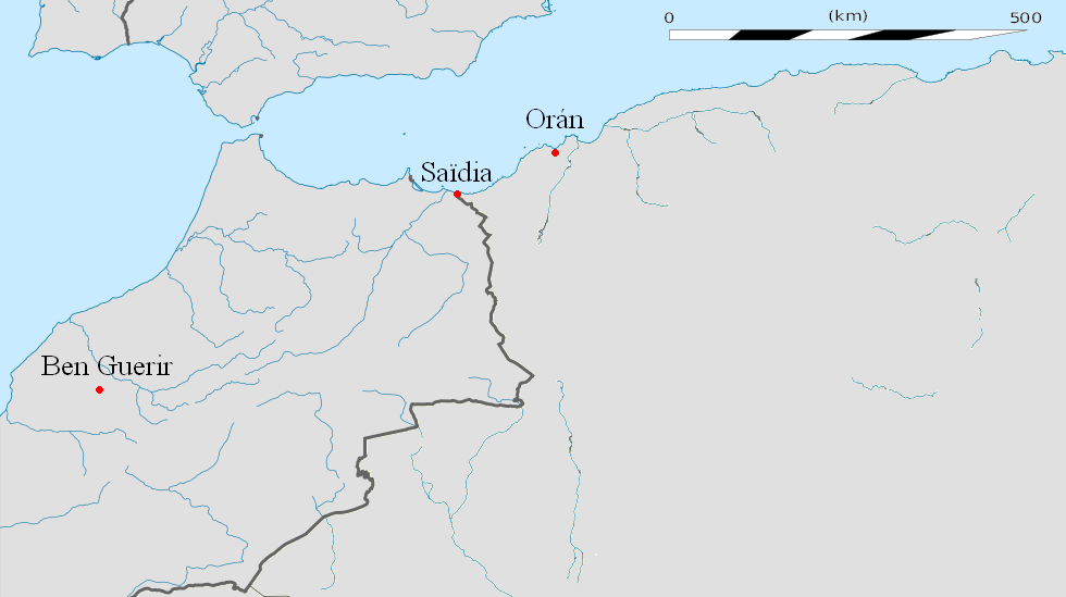 Para el artículo "Desaparición del Boeing B-47E Stratojet 52-534". Mapa base: File:Algeria location map.svg (retocado)